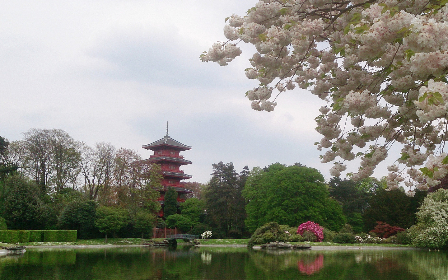 vue de la tour japonaise depuis les serres